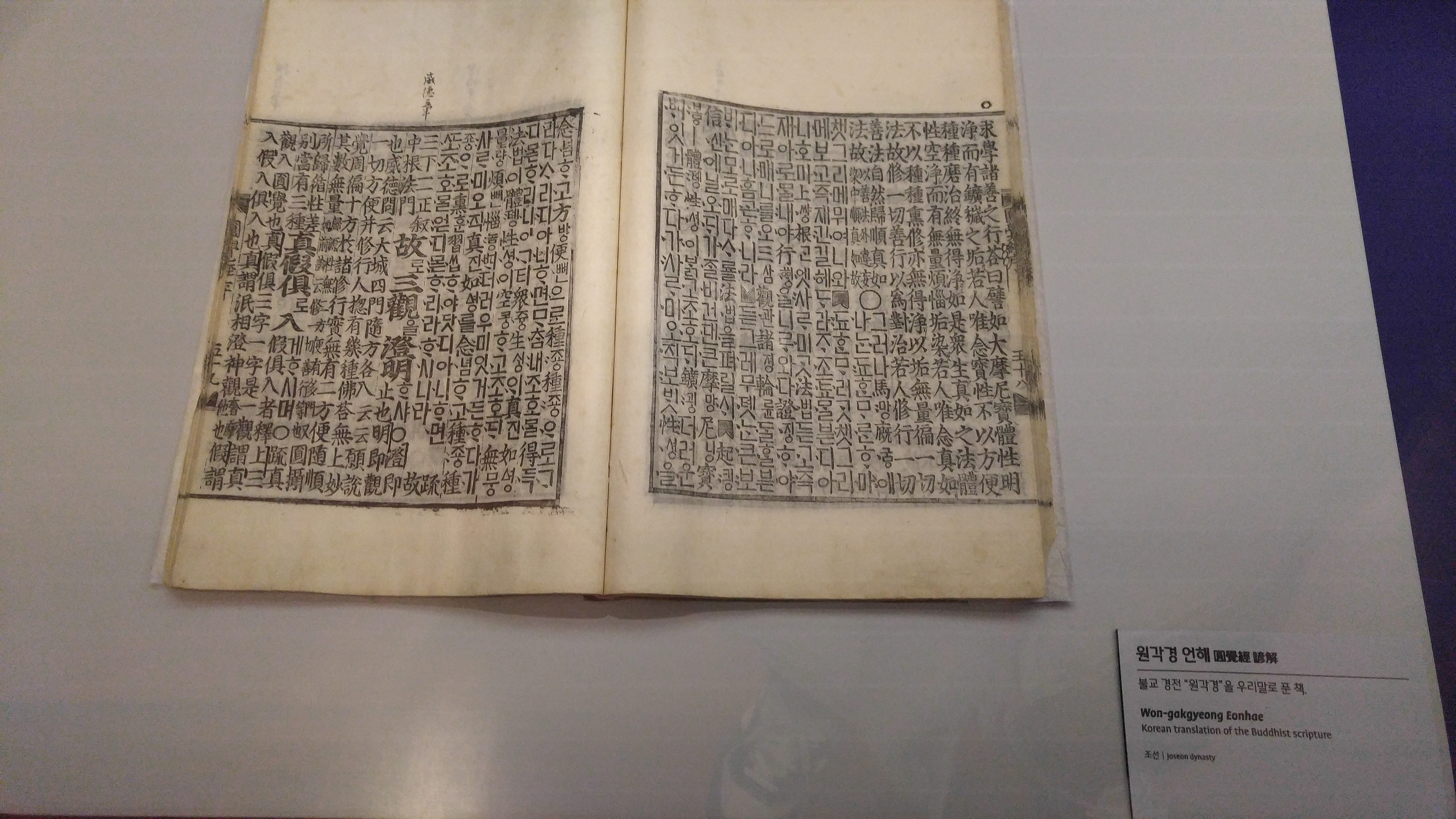 원각경 언해